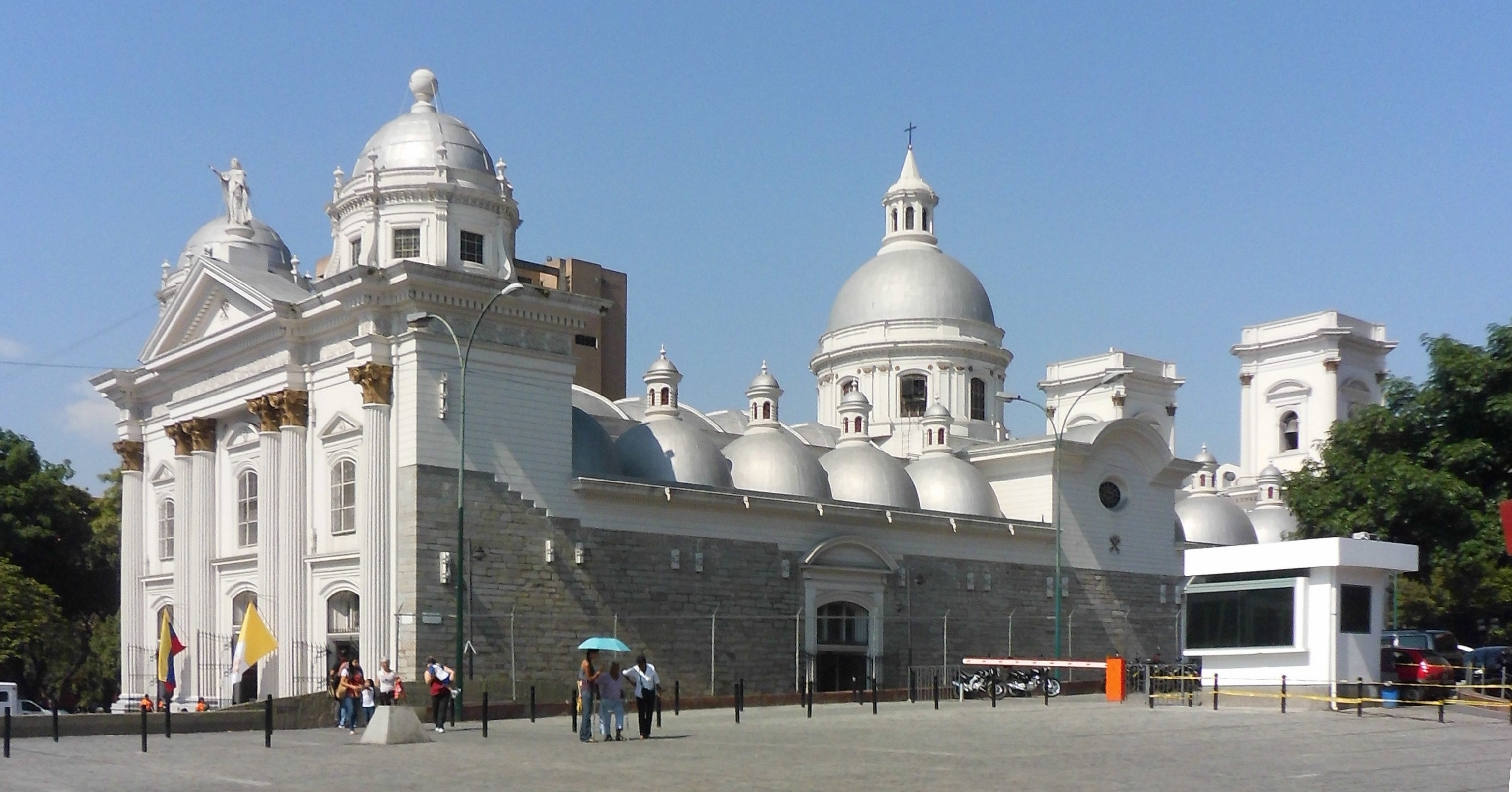 Basílica de Santa Teresa y Santa Ana. Caracas, Distrito Capital - Venezuela